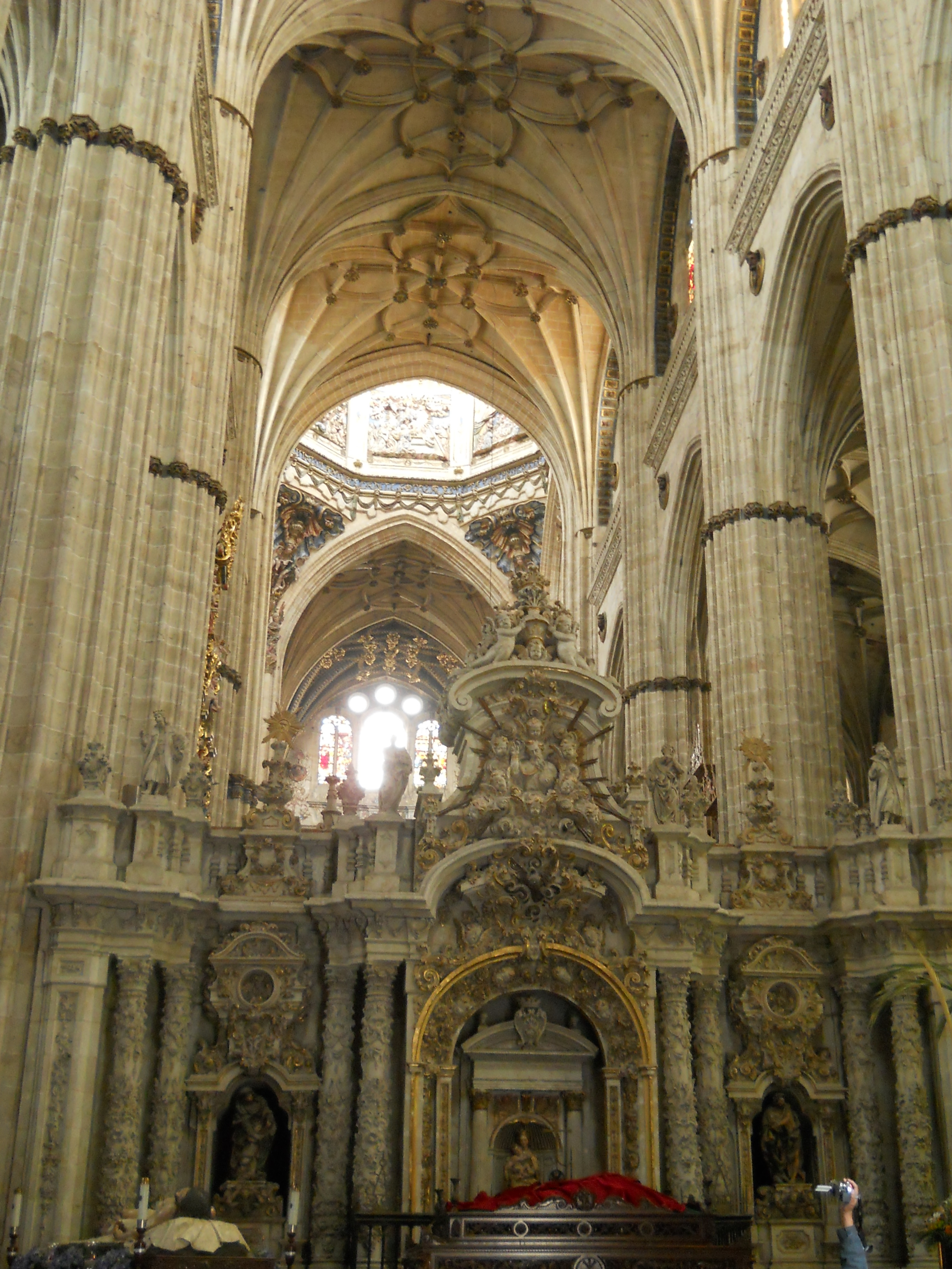 Interior de la Catedral Nueva de Salamanca, España